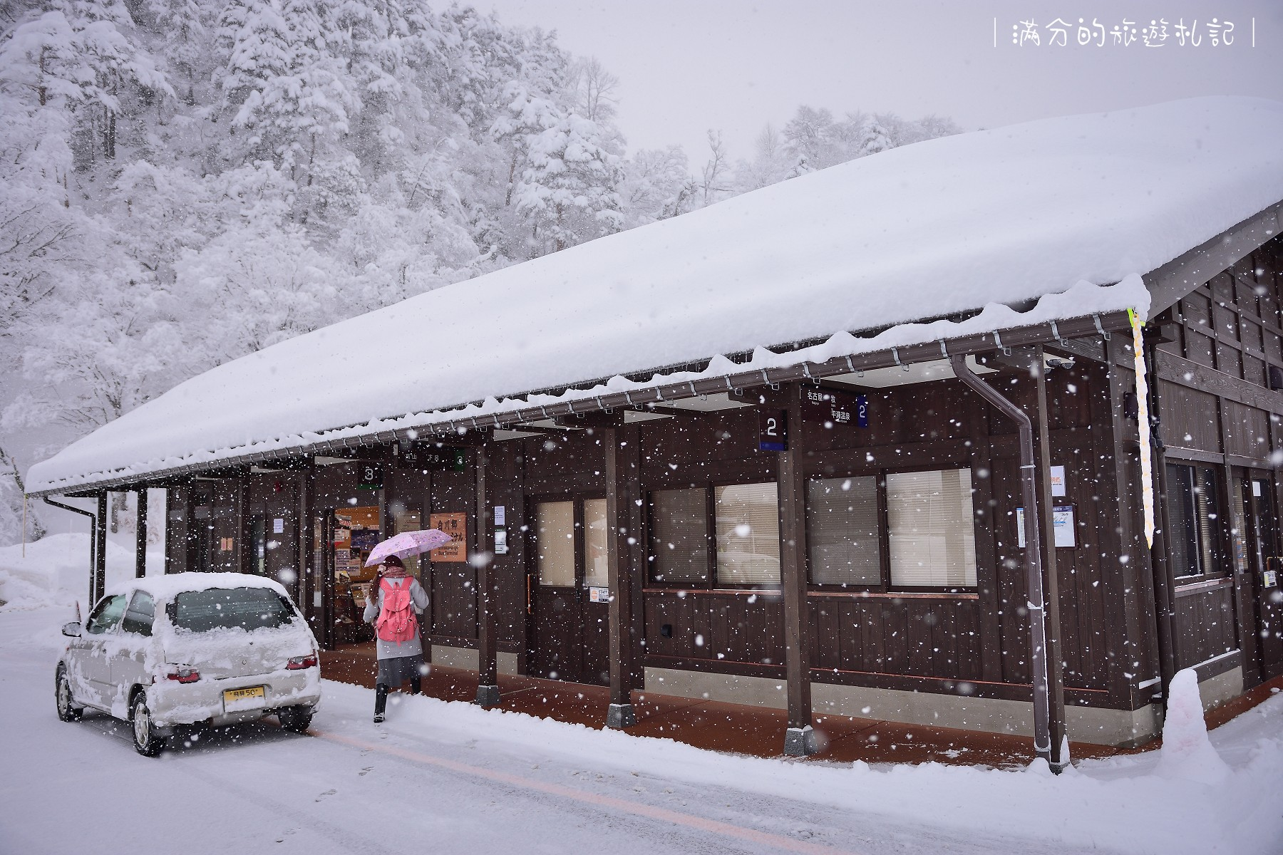 【日本交通】中部機場到白川鄉交通方式